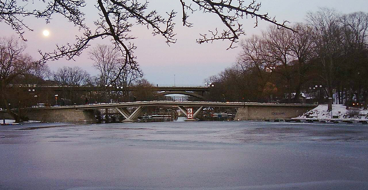 Långholmsbron in February 2006.